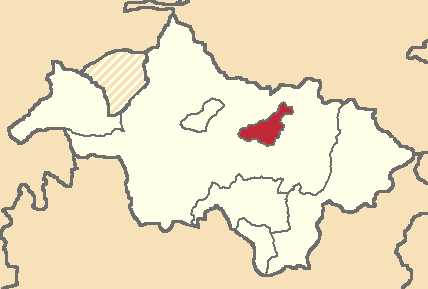 Mapa localizacor del cantón en Cañar, Ecuador